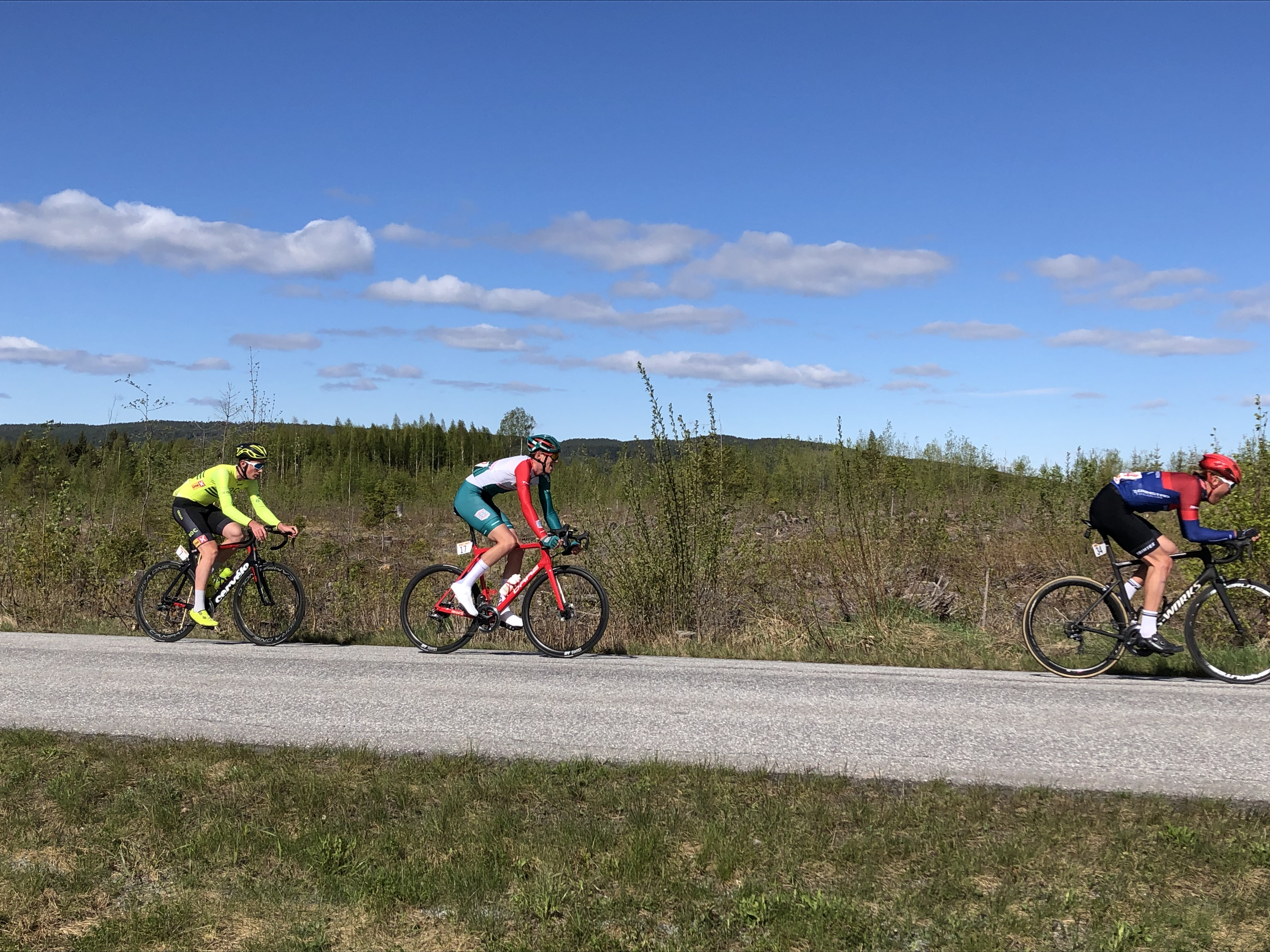 Ringerike Grand Prix 2019 - Juniorklassen- Bib 34 Oskar Myrestøl Johansson - 17 Tomas Sundlisæter - 7 Marcus Korsnes (leading group). Sluttresultat: Johansson 1, Korsnes 2, Sundlisæter 3.